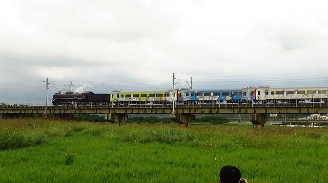 台鐵海線下頭份溪橋上的DT668蒸機 was filmed by TDCKW on 20170611